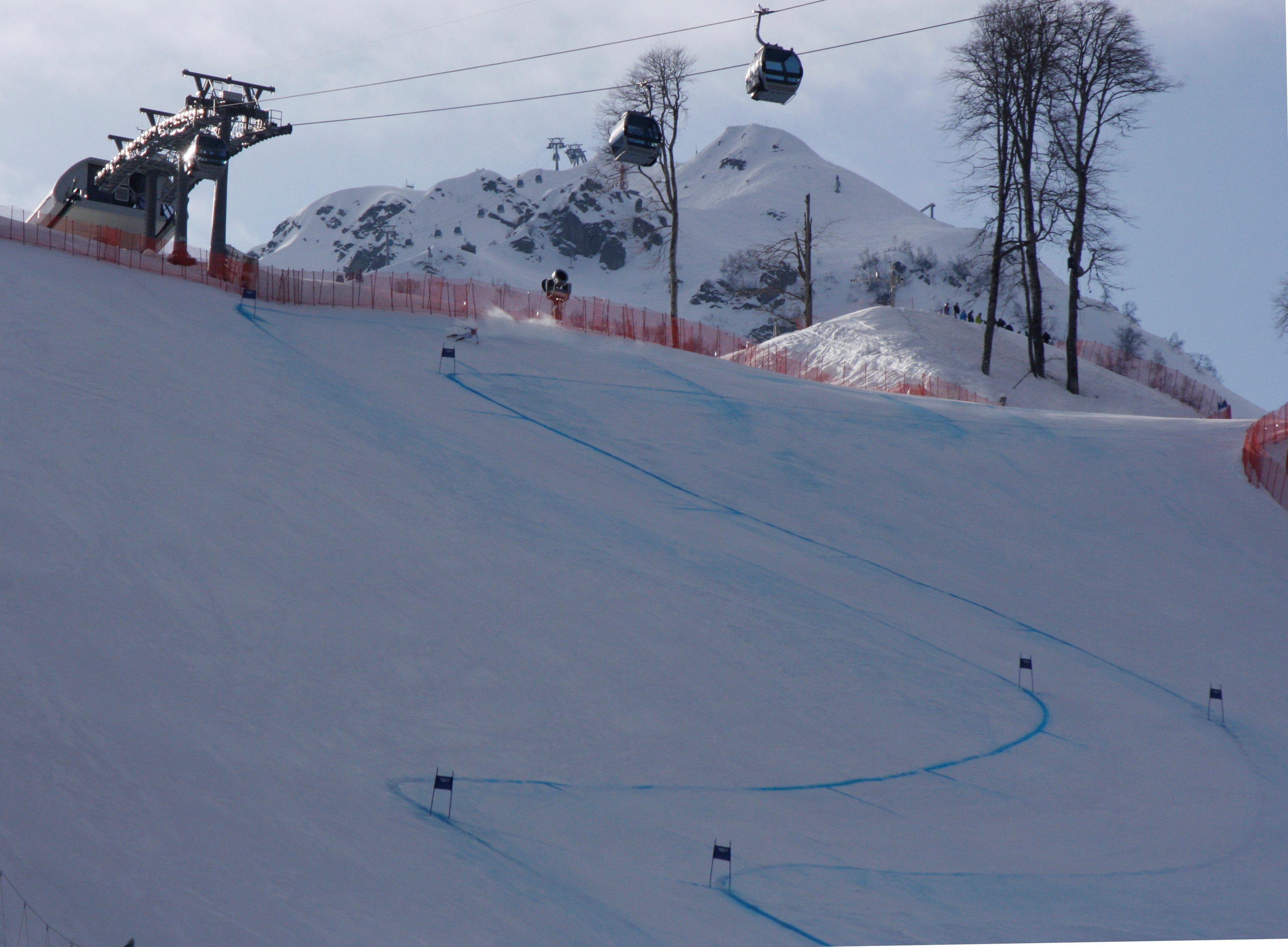 На трассе женского скоростного спуска на зимних Олимпийских играх 2014 в Сочи